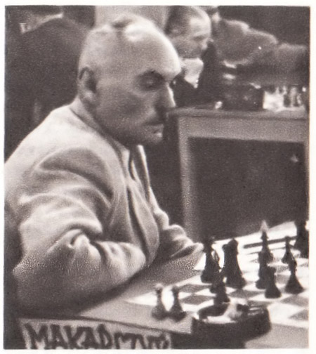 Kazimierz Makarczyk (ur. 1 stycznia 1901 w Warszawie, zm. 27 maja 1972 w Łodzi) – polski szachista, złoty medalista olimpijski.